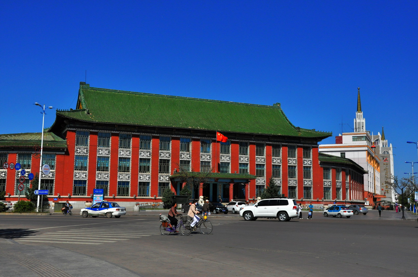 呼伦贝尔市政府